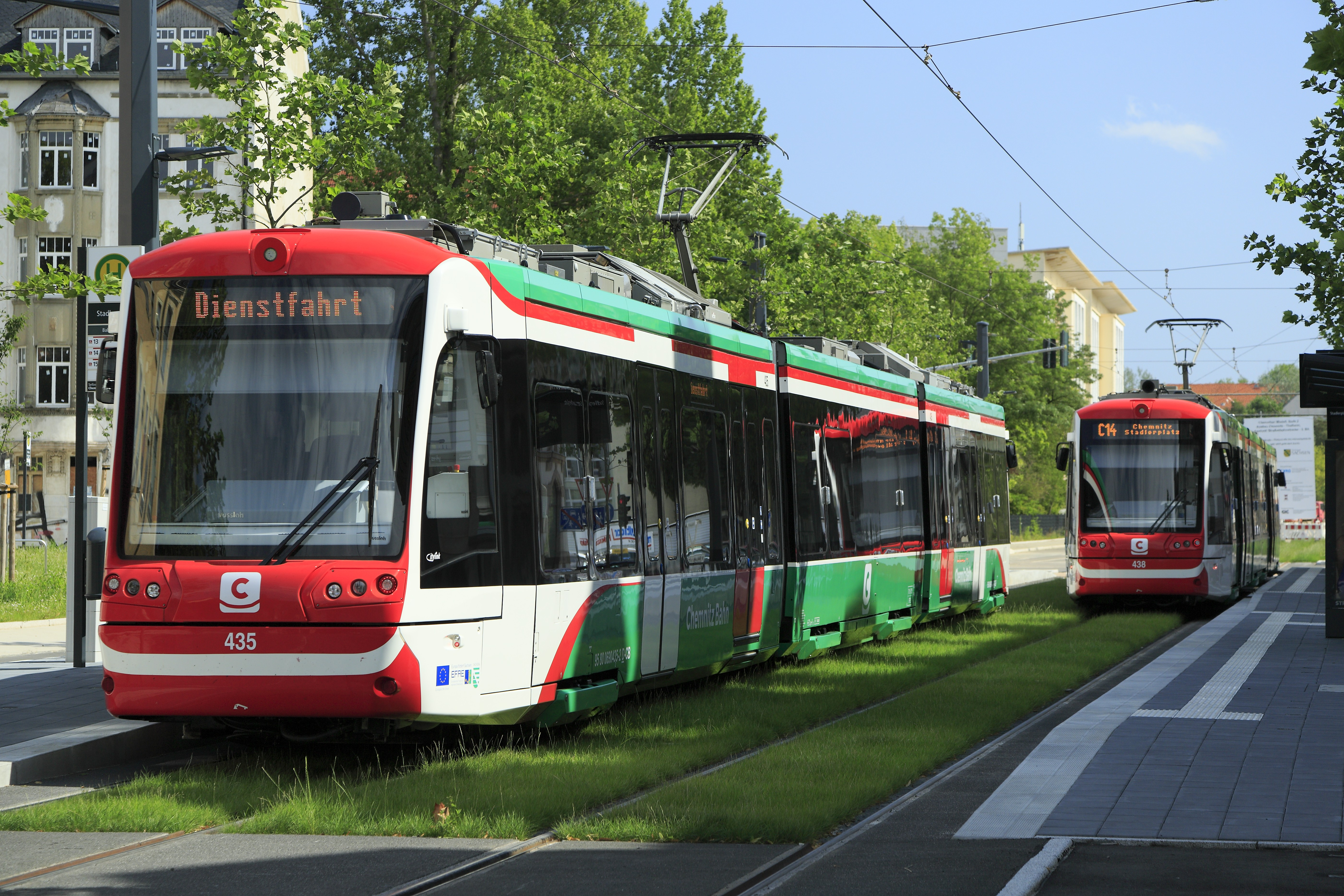 Zwei »Citylink«-Triebwagen am provisorischen Endpunkt Stadlerplatz. In der Turnstraße wurde nur eine einfache Gleisverbindung eingebaut. Wegen des Verkehrens in Zugbündeln werden beide Bahnsteiggleise benötigt, der jeweils eingefahrene Zug fährt als mit »Dienstfahrt« beschilderte Rangierfahrt über die Gleisverbindung und wartet dort das Eintreffen des folgenden Zuges ab. Damit sieht dessen Triebwagenführer, dass das Ankunftsgleis frei ist.Der linke Triebwagen 435 ist als Rangierfahrt zum Abfahrtsbahnsteig vorgerückt und wird hier auf sein Ziel umgeschildert. Der rechte Triebwagen 438 setzt anschließend auf das Abfahrtsgleis um. Wegen Verzicht auf den Einbau einer Stellwerksanlage für die kurze Zeit bis zu Inbetriebnahme der Stecke bis zum Bahnhof Technopark muss dieses etwas umständliche Verfahren angewendet werden.Die Züge stehen diagonal versetzt an den Haltepositionen mit erhöhtem Bahnsteig. An den im Moment freien Positionen mit einer Bahnsteighöhe von 200mm werden die Variobahnzüge der städtischen Linie 3 verkehren.